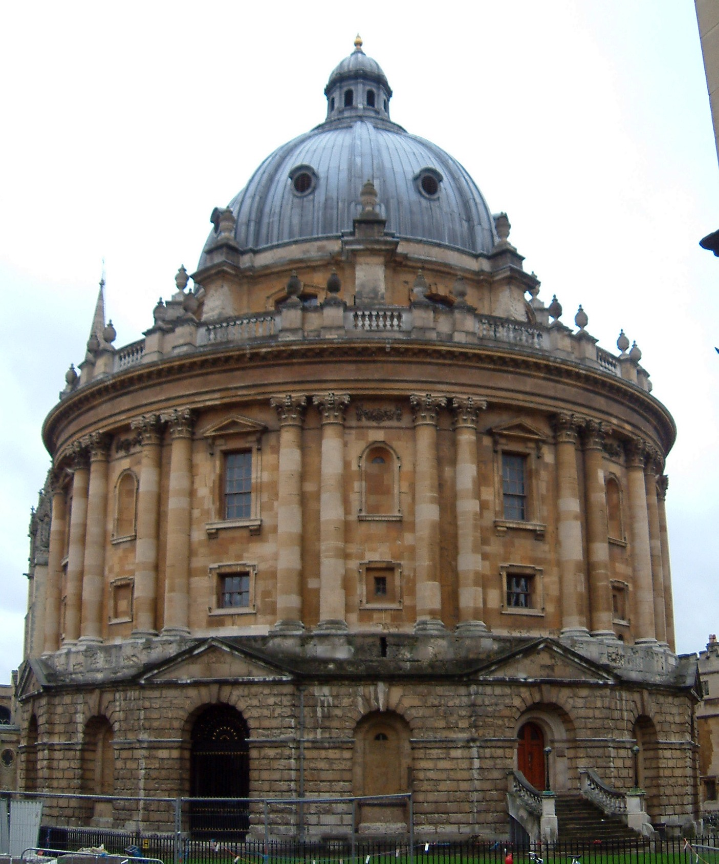 Oxford, ANGLETERRE, ROYAUME-UNI.